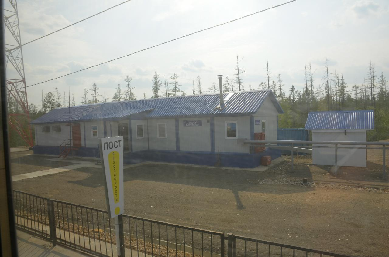 Поездка 5-6 августа 2019 г. по маршруту Якутск - Нерюнгри - Якутск во вновь назначенном поезде № 327 Нижний Бестях - Нерюнгри. Историческое событие - пуск пассажирского движения поездов из центральной Якутии, почти из Якутска. Разъезд Карбыкан (279 км)